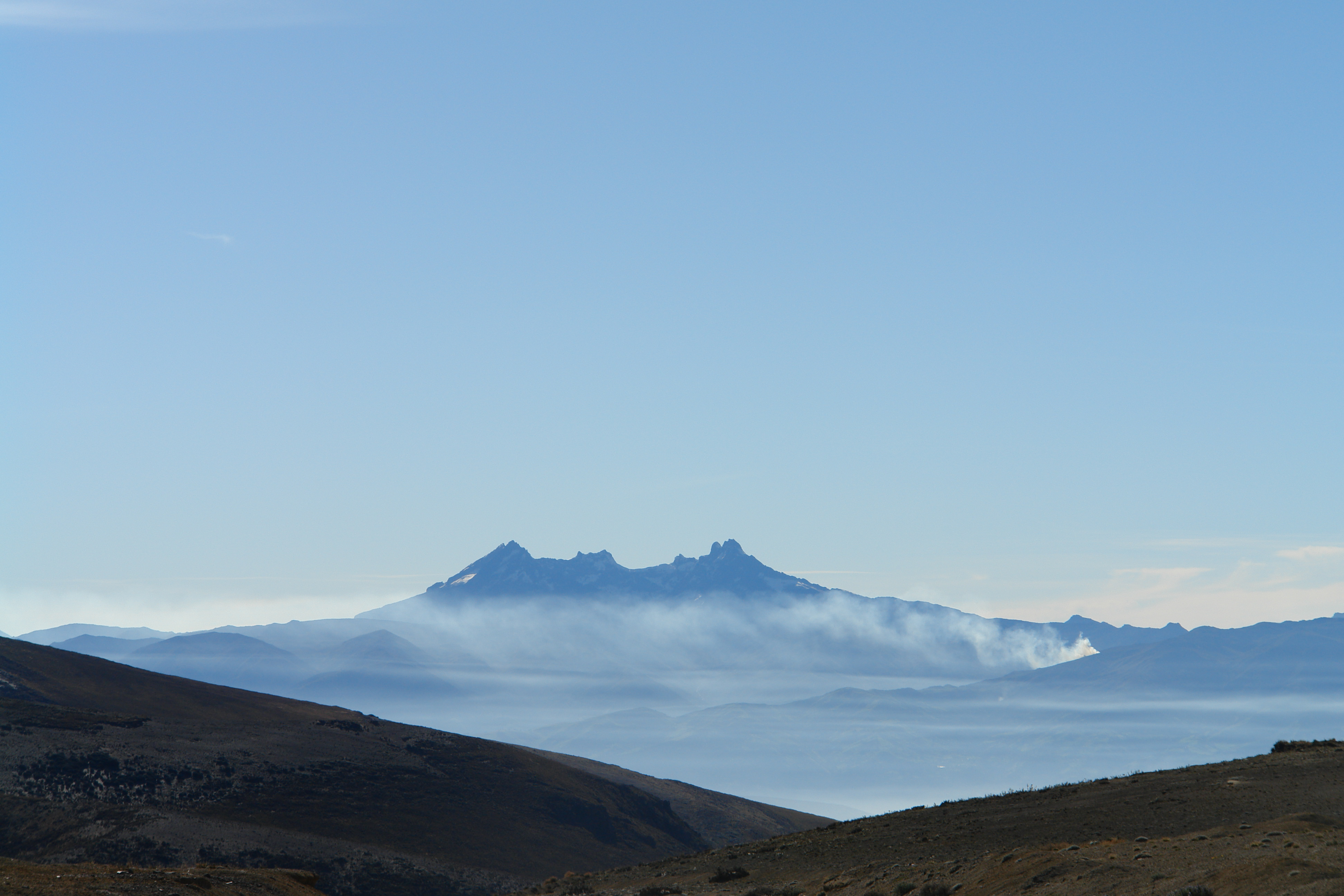 Vista del volcan desde Riobamba Fecha: 2006 Autor: Alfredobi